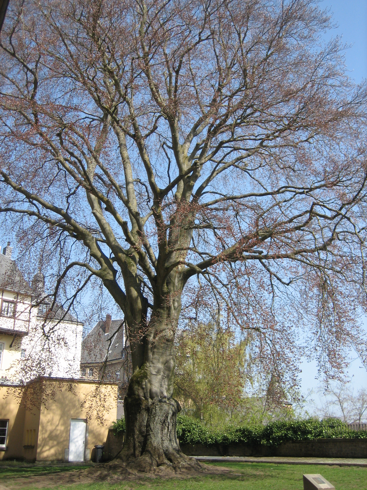 Sujet: D'Bluttbuch am Haff vum Geschichtsmusée vun der Stad Lëtzebuerg, am Abrëll 2009. Auteur: user:zinneke Lizenz: CC-by-sa/3.0/lu